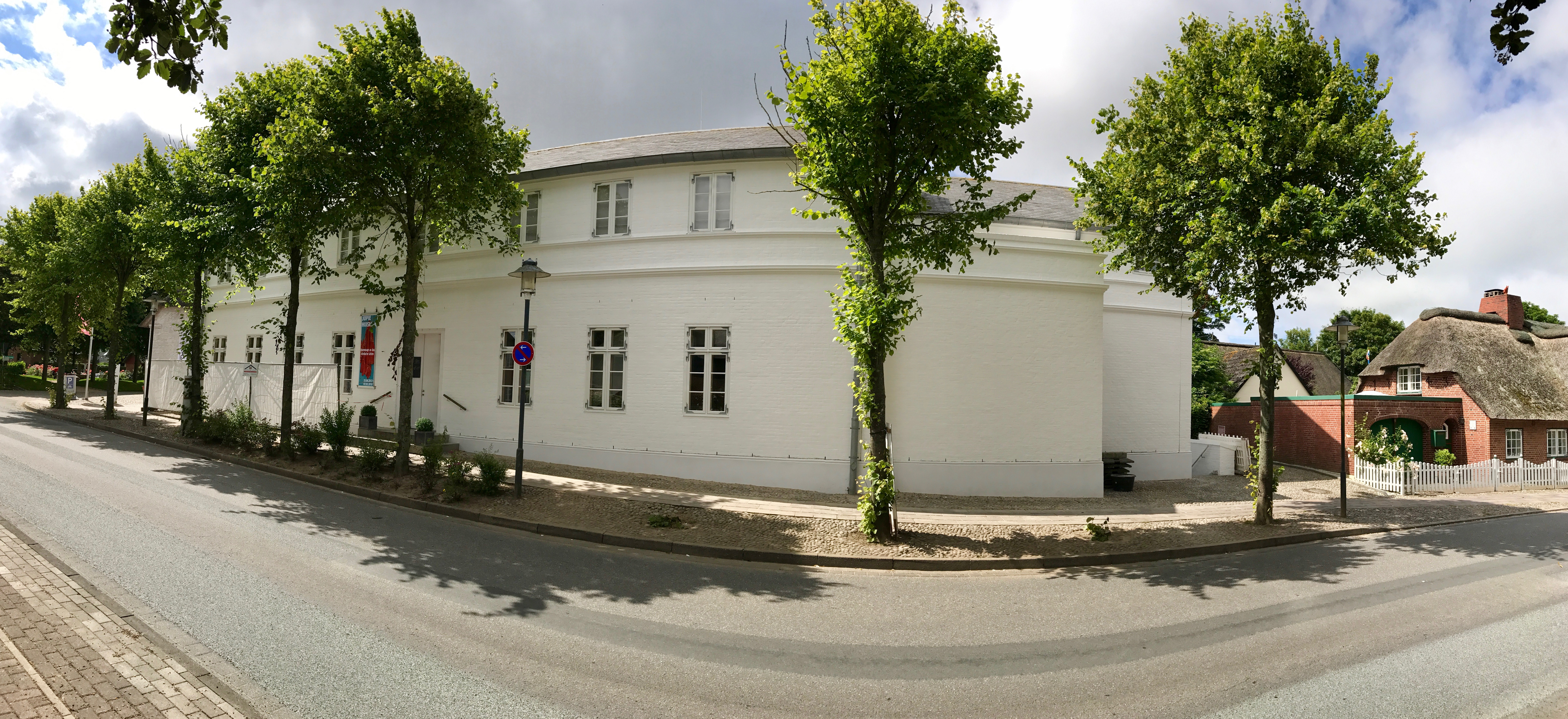 Das Eingangsgebäude des Museums Kunst der Westküste auf Föhr.